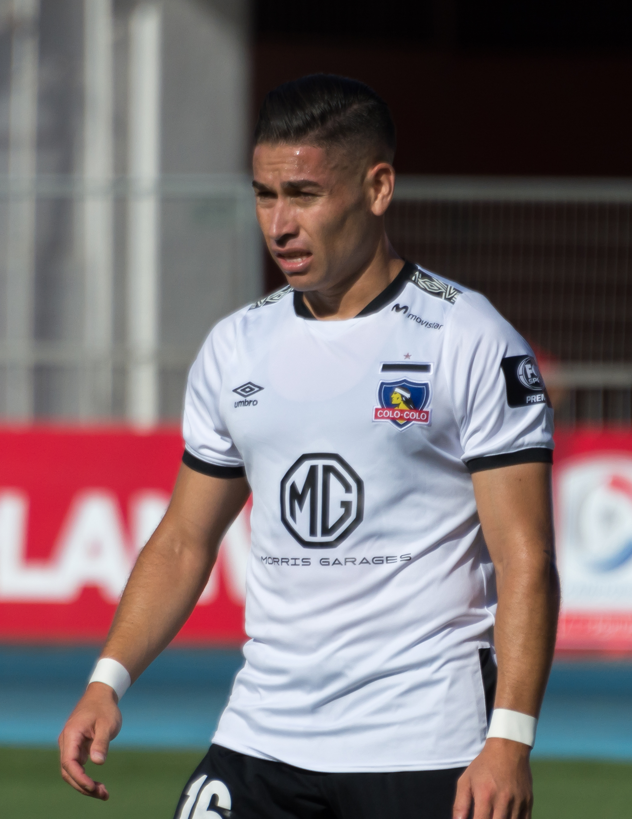 Audax Italiano v Colo-Colo, Estadio Nacional, Ñuñoa, Santiago, Región Metropolitana, Chile